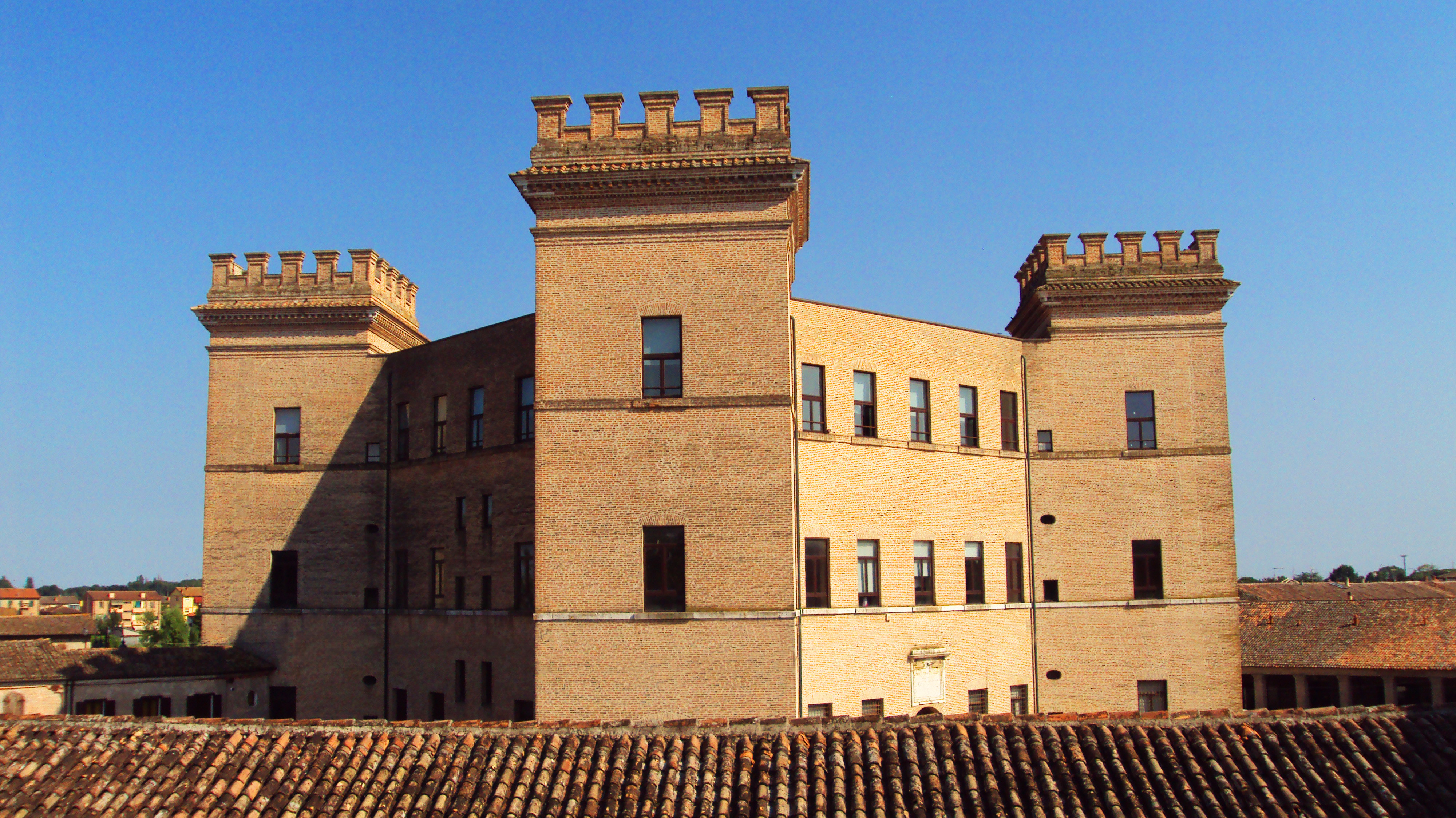 Castello Estense di Mesola - MIBAC This is a photo of a monument which is part of cultural heritage of Italy.